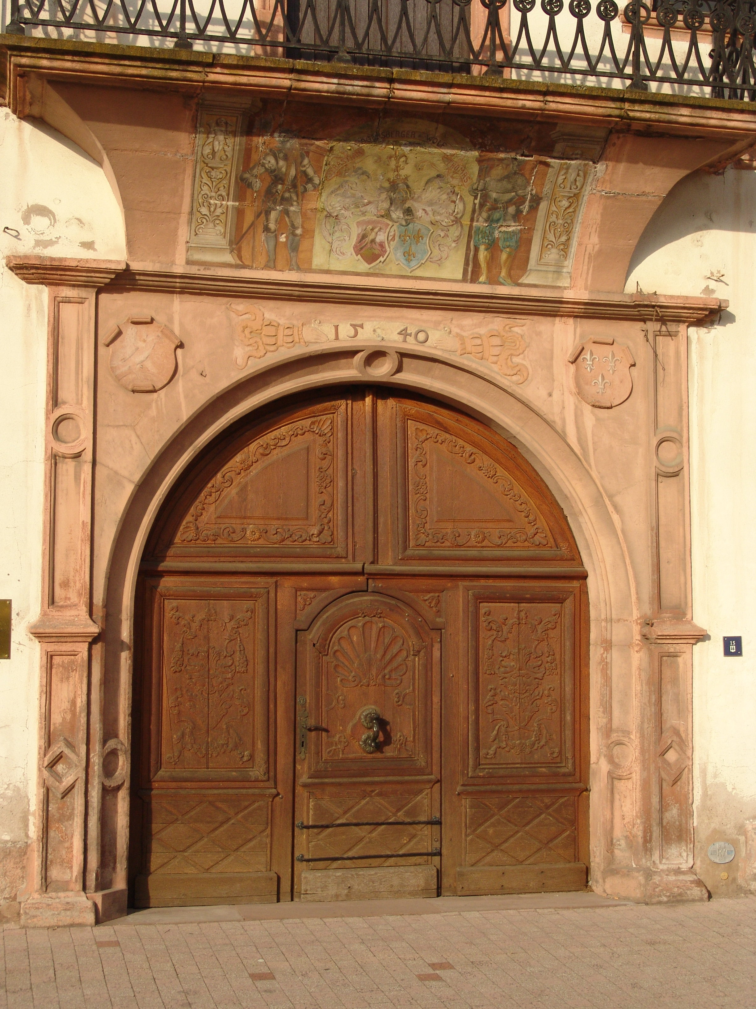 Maison Vogelsbergermaison